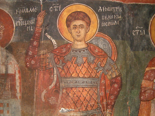 Свети Димитър, стенопис от църквата „Свети Димитър“ в Бобошево.